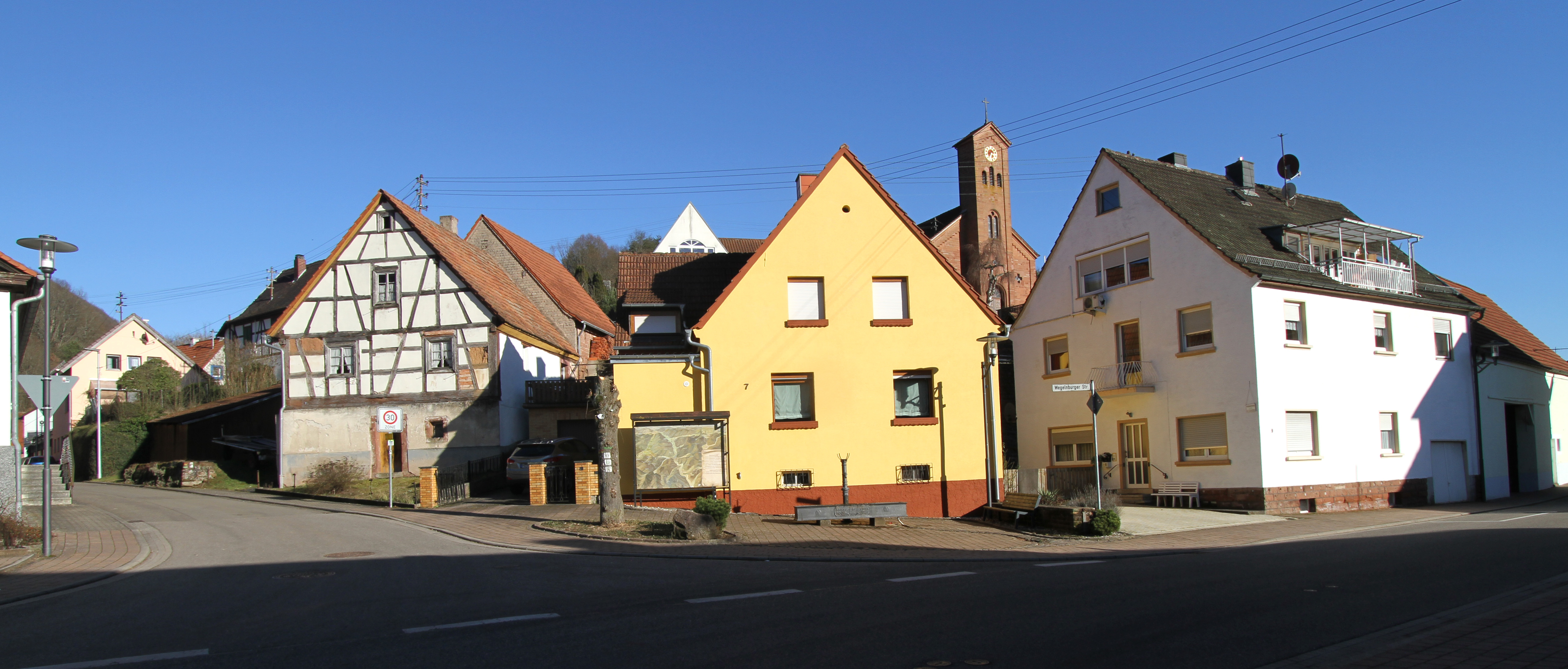 Schönau (Pfalz)